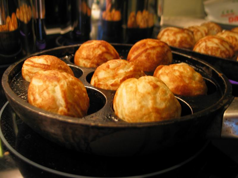 Æbleskiver is a traditional Danish dessert. If served in December, it is often accompanied by Gløgg.